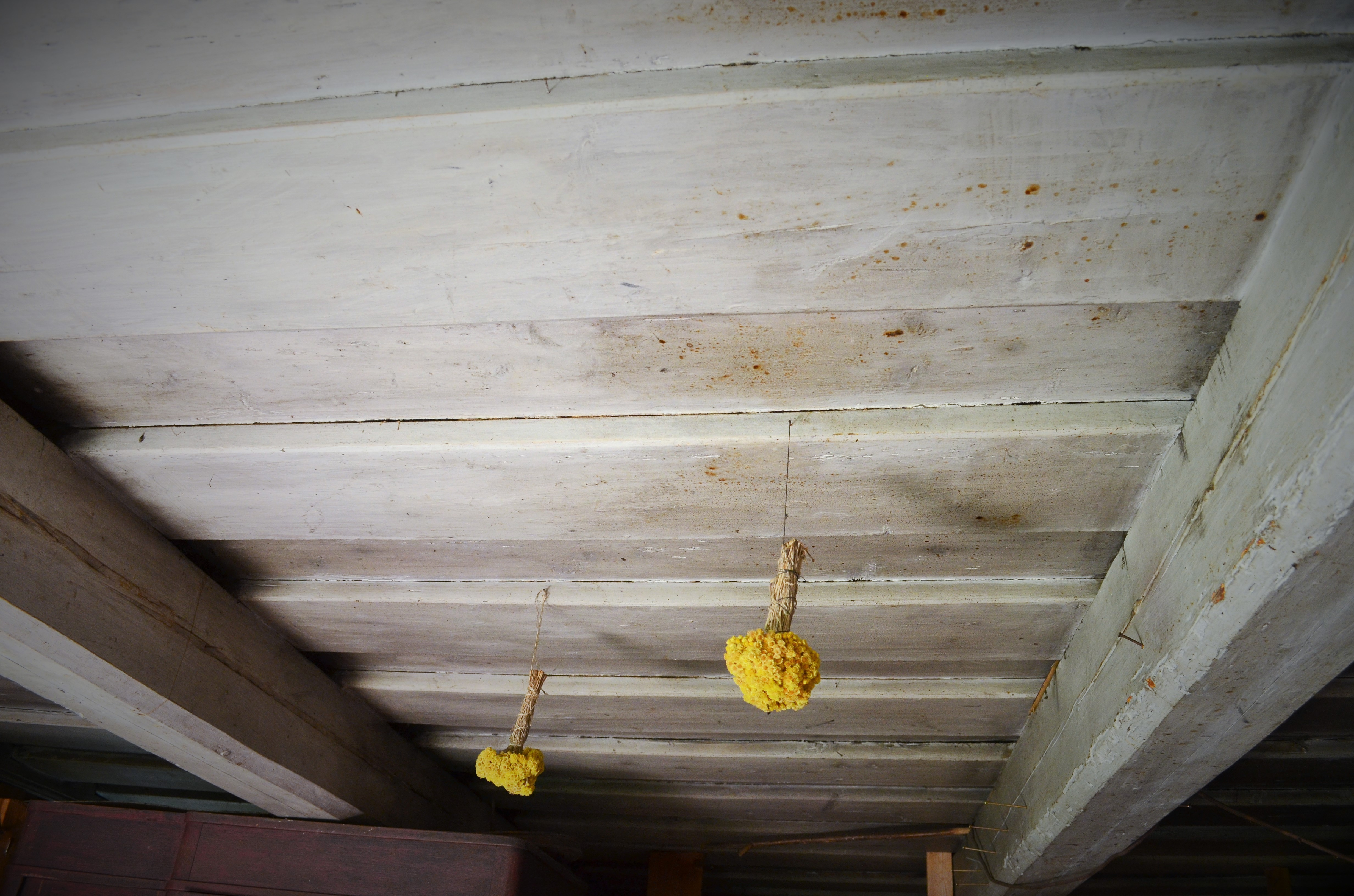 Pirkios lubos. Musteika, Varėnos r.